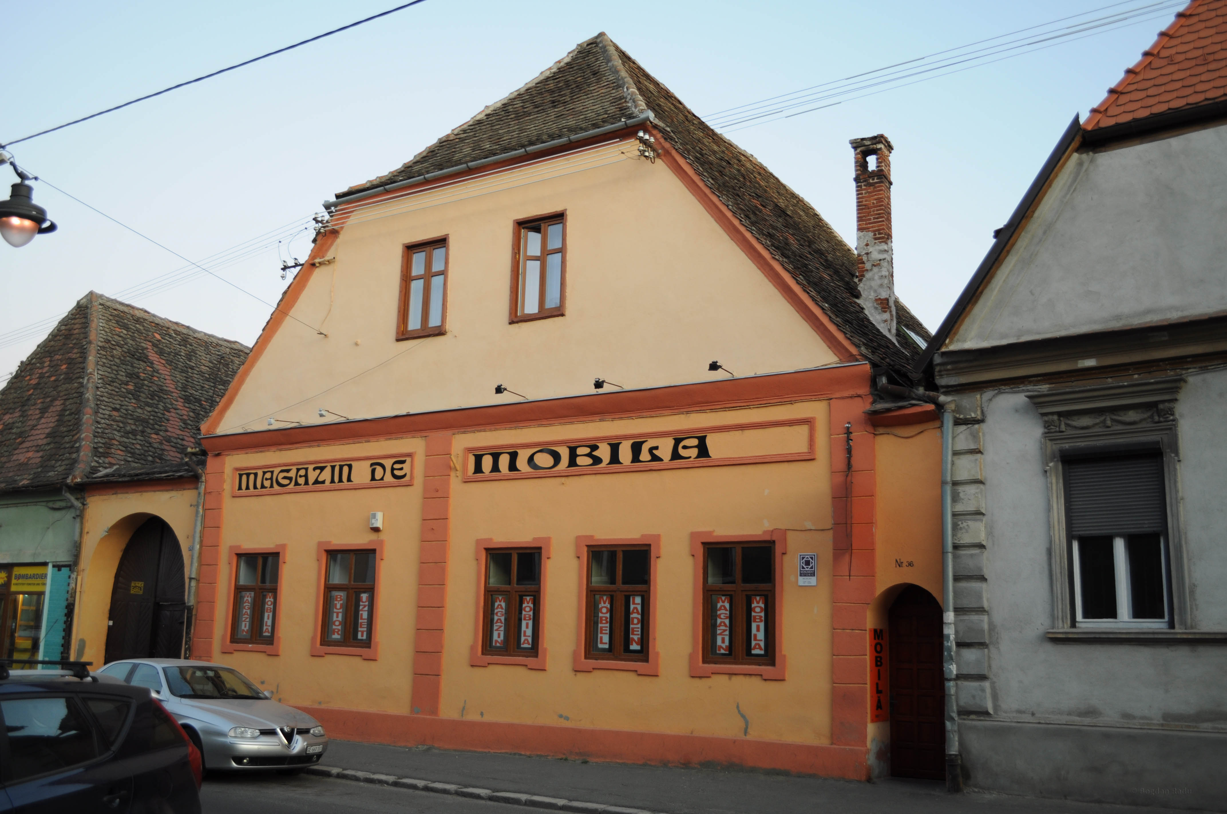 Str. 9 Mai 36